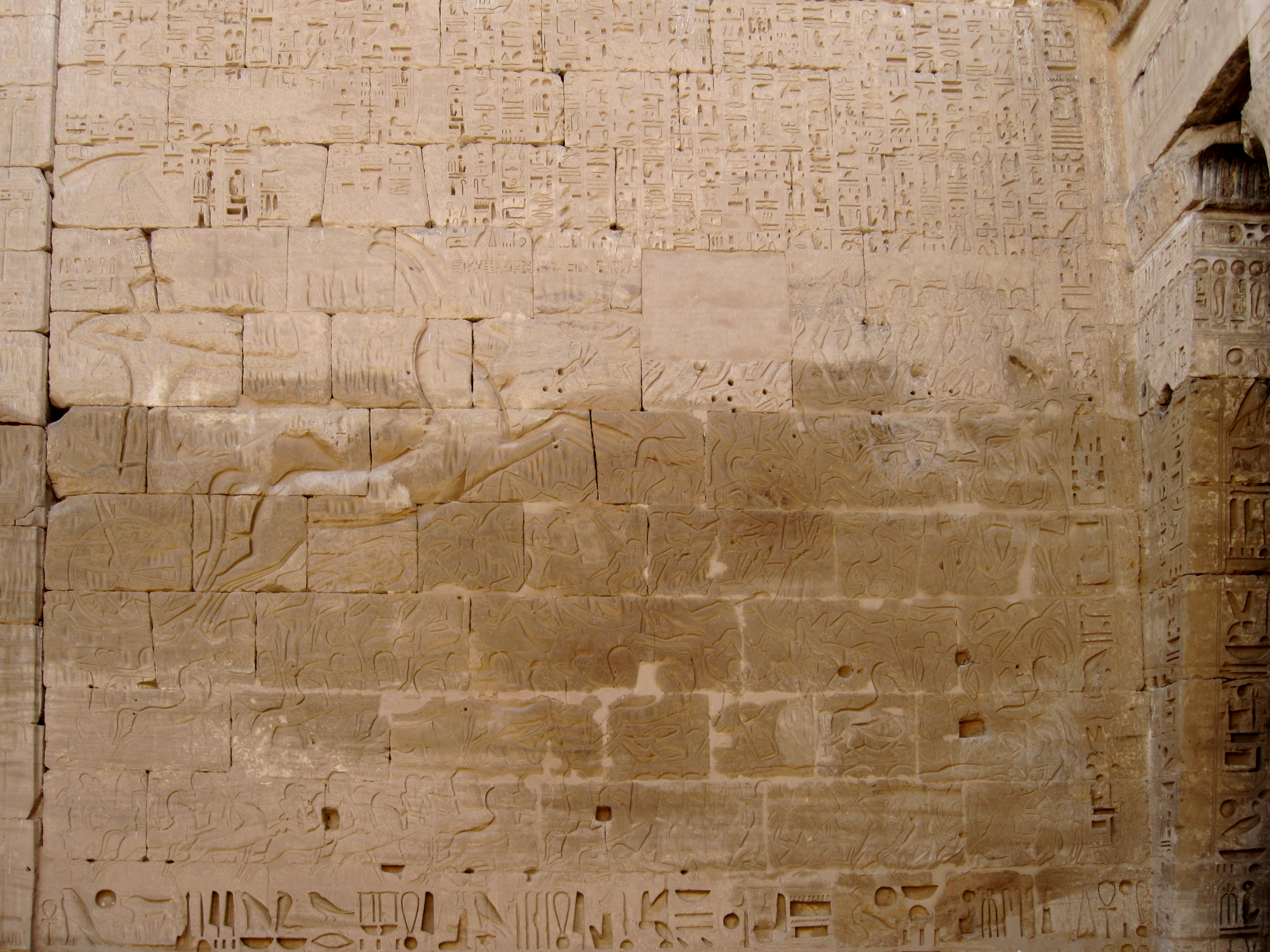 König (Pharao) Ramses III. auf einem Streitwagen triumphiert über seine libyschen Feinde. Relief am ersten Pylon im ersten Hof des Totentempels Ramses’ III. in Medinet Habu, Ägypten